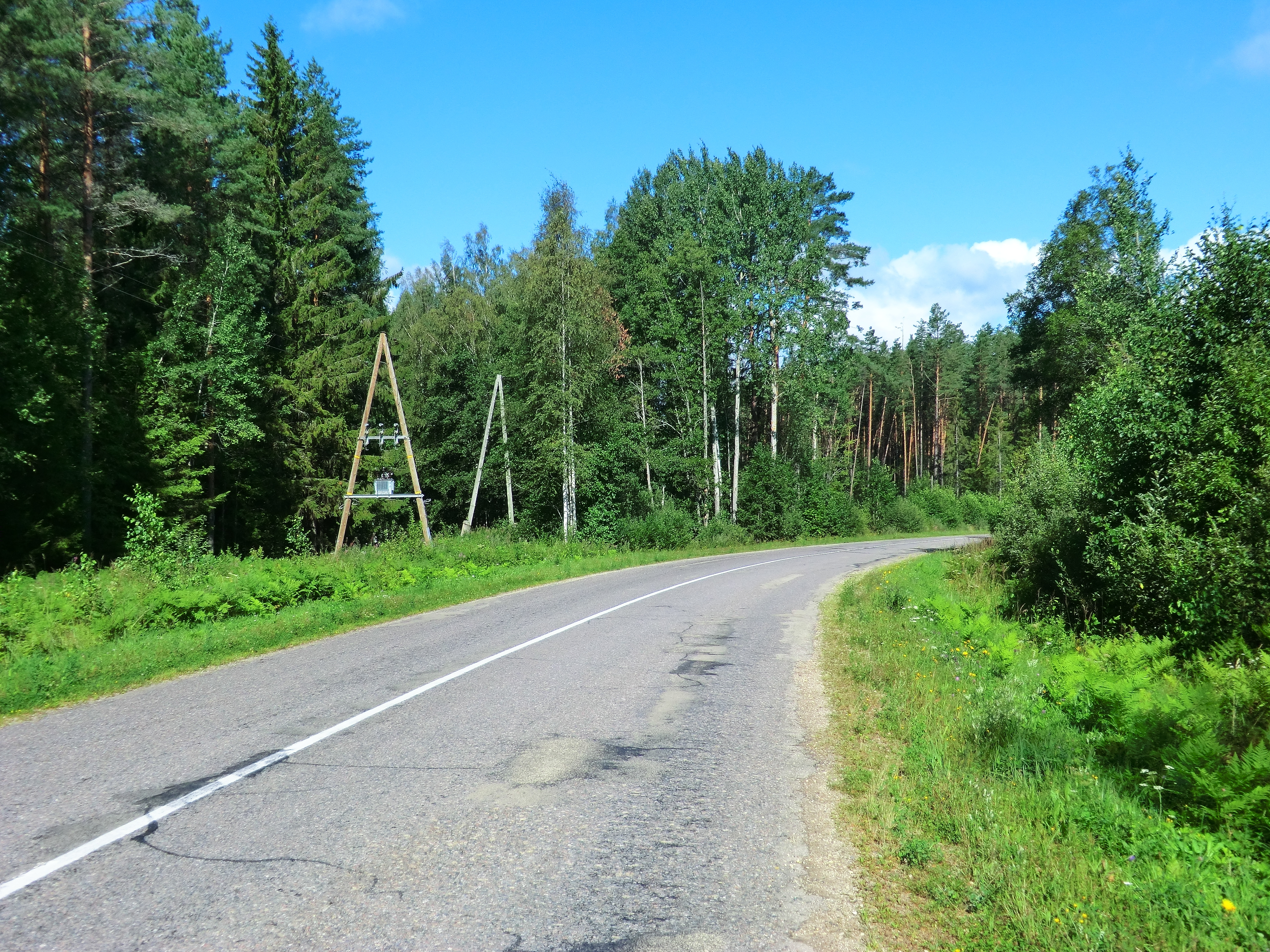 шоссе Р46